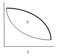 בתרשים 1 ב נתונה בעיית מיקוח ( S,d). תת הקבוצה של S שמייצגת את אוסף הנקודות היעילות פארטו היא הקו השחור המודגש. פתרון 𝛗 שמקיים את עיקרון היעילות שייך לתת קבוצה זו.